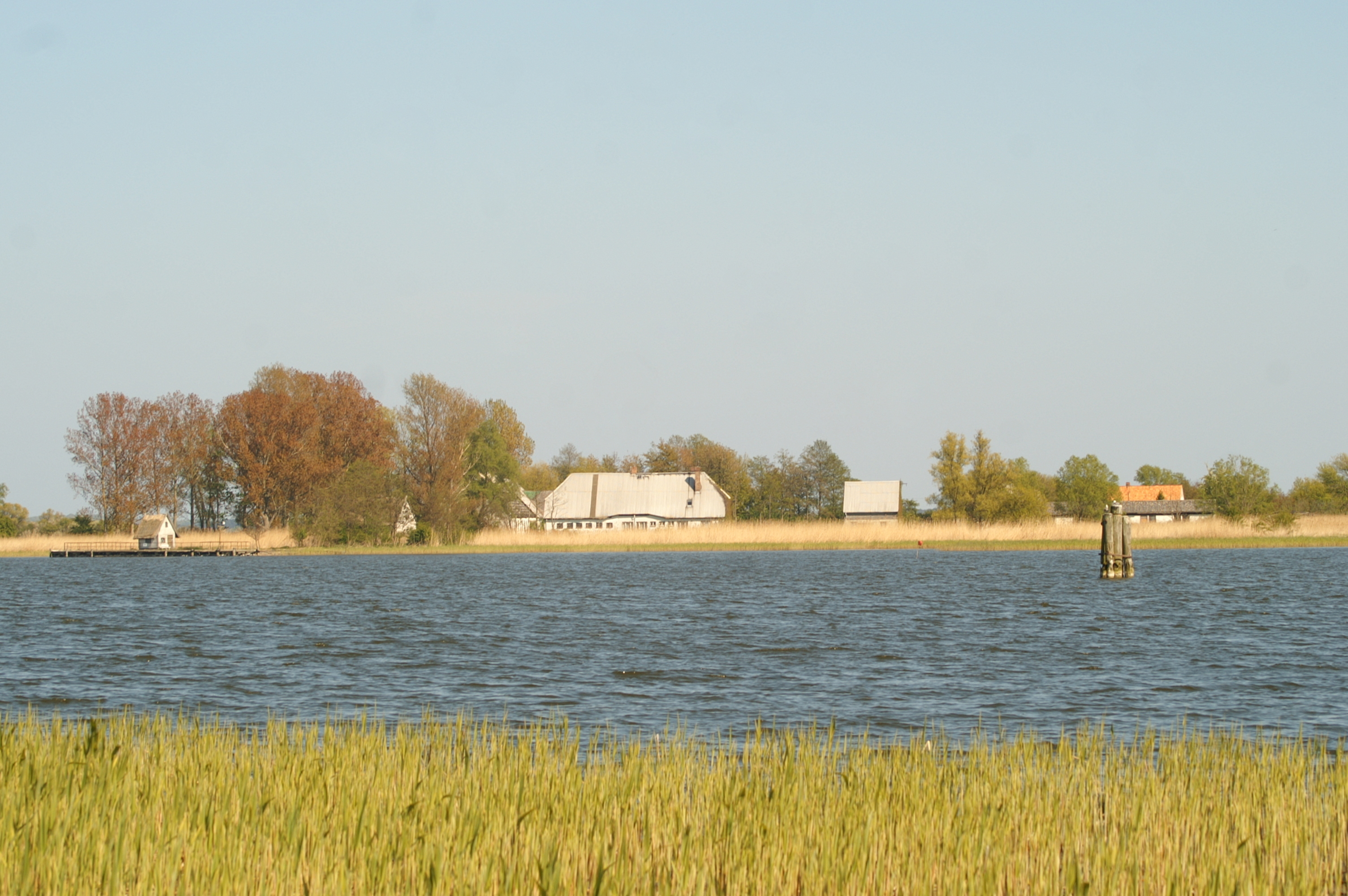 Görmitz, Blick vom Anleger Netzelkow zur Insel, Gebäude des ehemaligen Ferienheimes